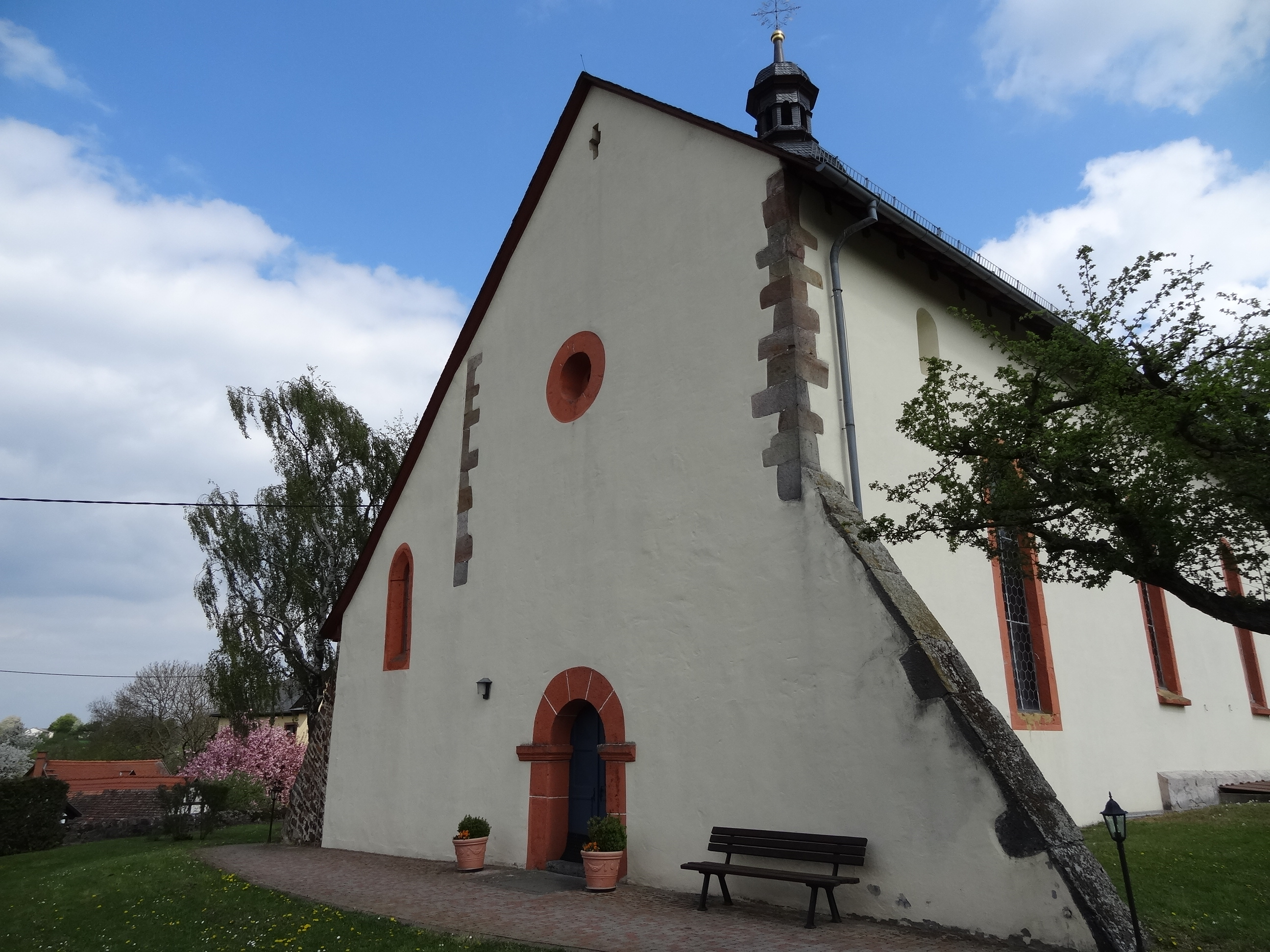 Evangelische Pfarrkirche Trais-Münzenberg